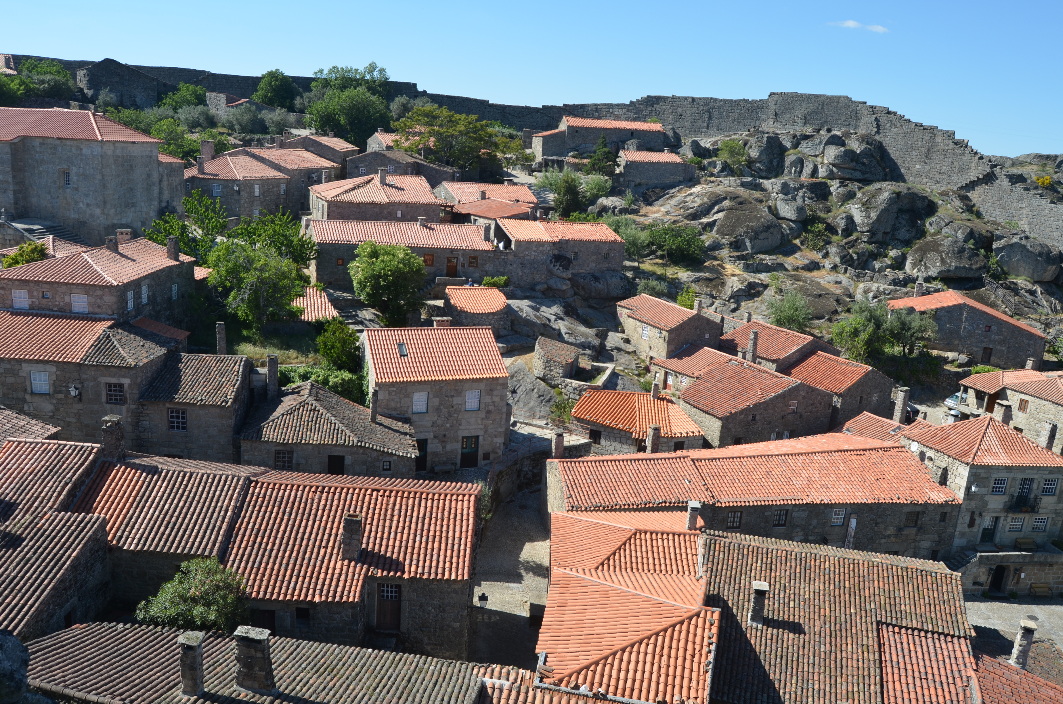 Caminho Histórico de Sortelha XI